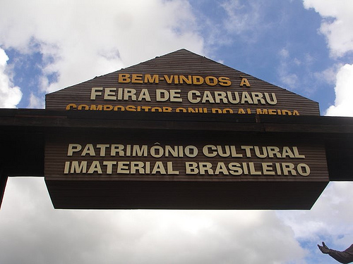 Pórtico de Entrada da Feira de Caruaru, Pernambuco, Brasil.